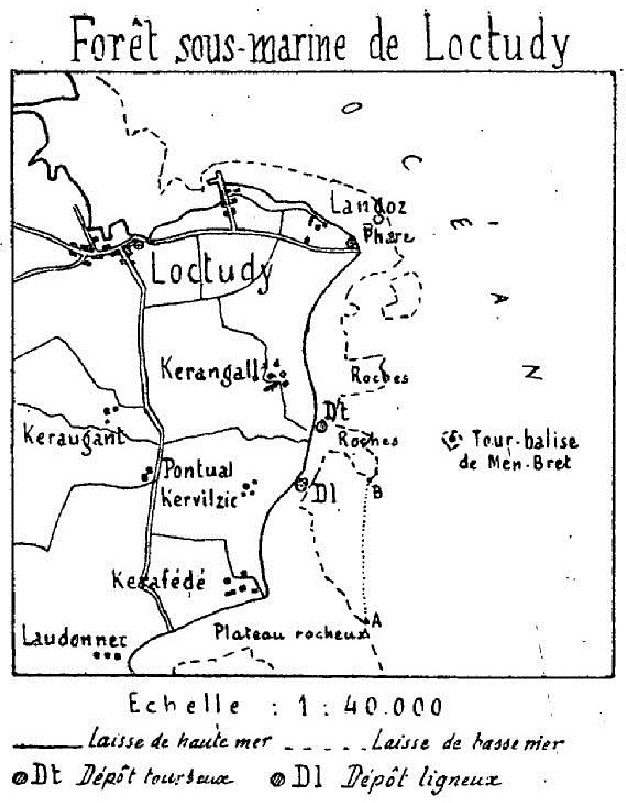 Carte de la forêt sous-marine de Loctudy (Bulletin de la Société archéologique du Finistère, 1906)